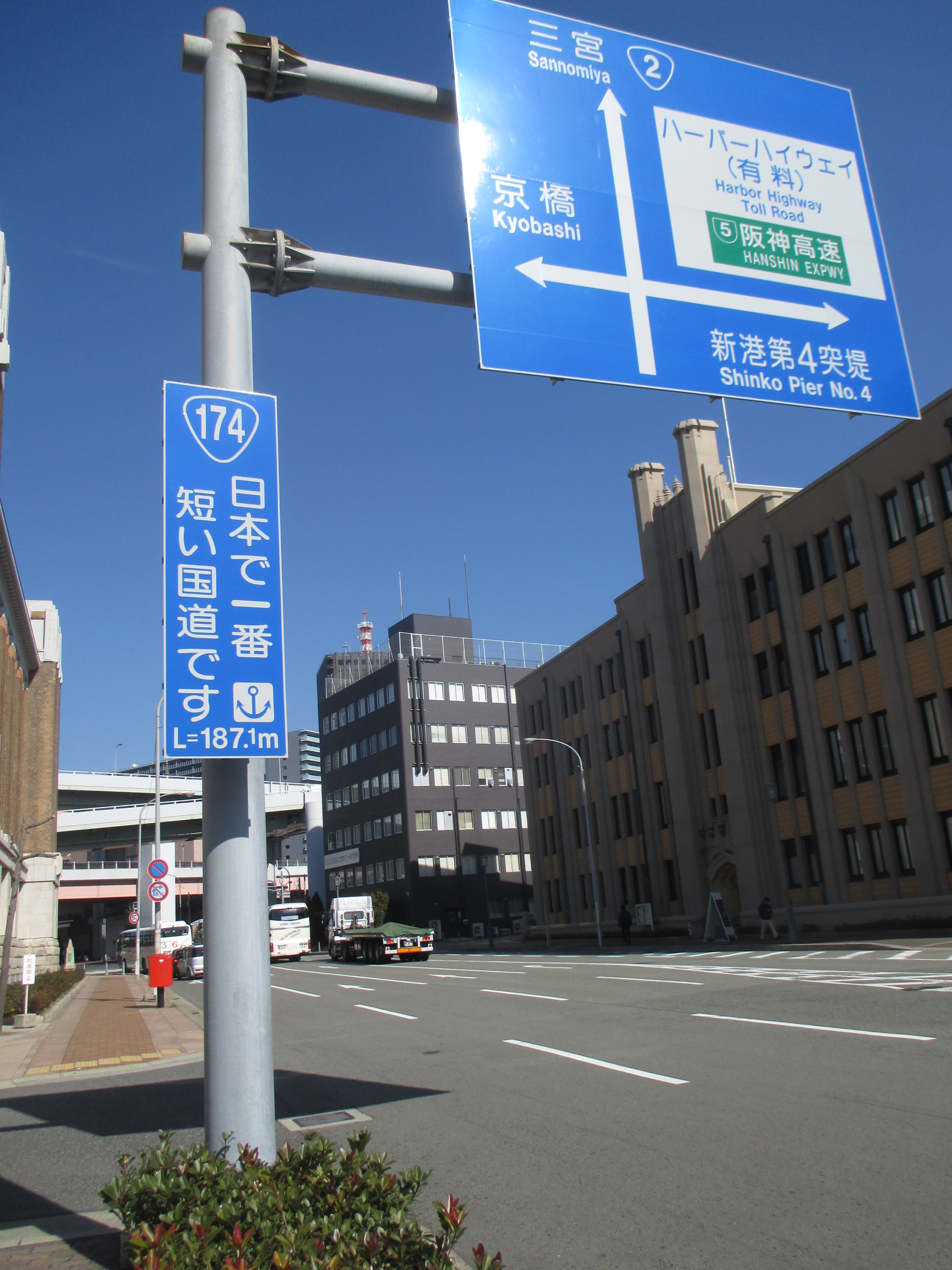 日本で一番短い国道です(国道174号 187.1m)